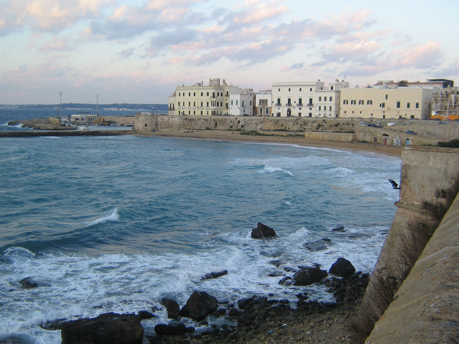 Gallipoli: paesaggio